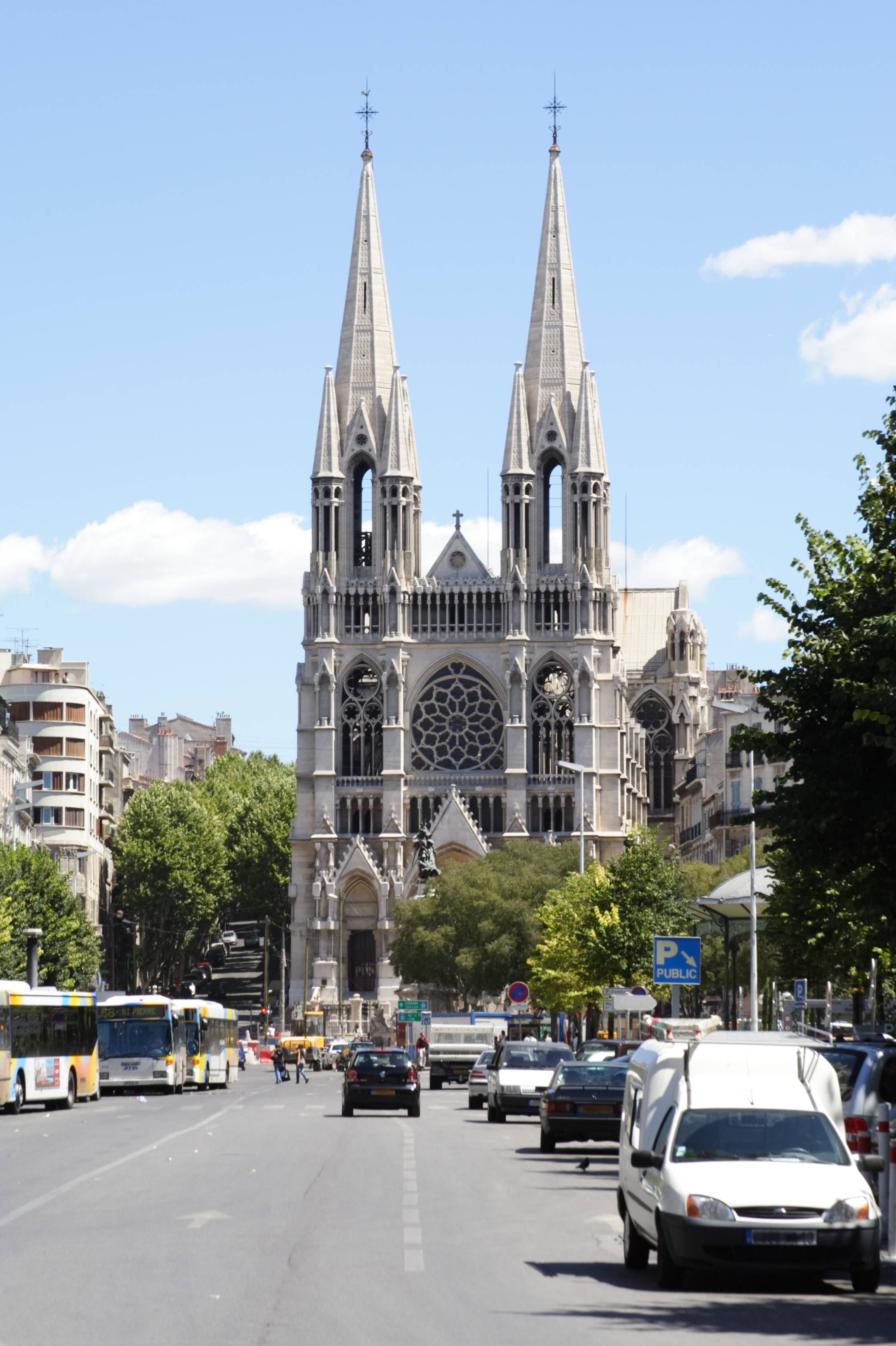 L'église Saint Vincent de Paul, so called "des Réformés"(Marseille, France)